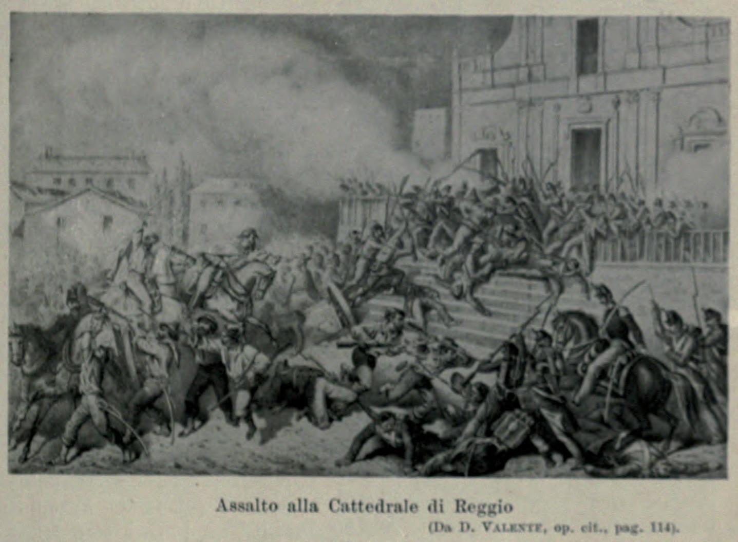 Assalto alla cattedrale di Reggio Calabria durante la battaglia di Piazza Duomo.